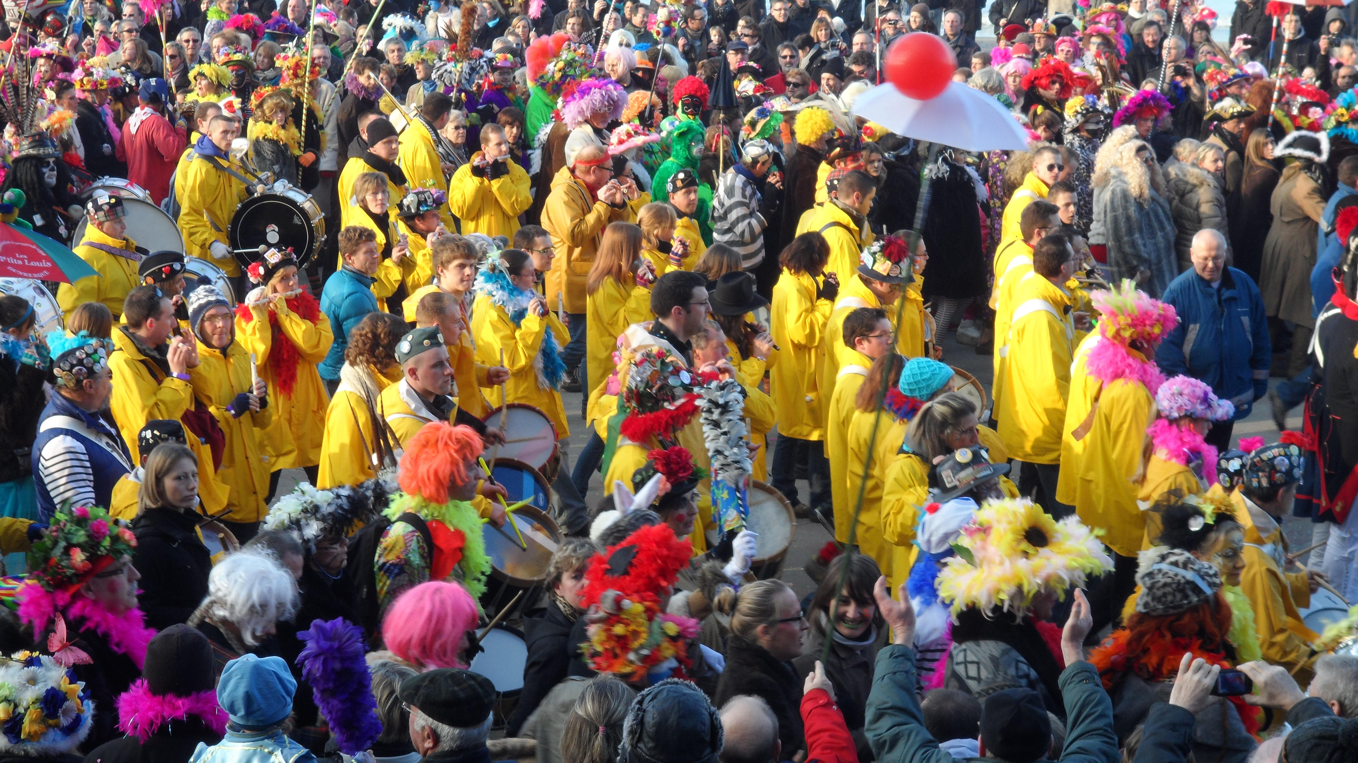 La "clique" (la fanfare) du carnaval de Dunkerque lors de la bande de Malo-les-Bains